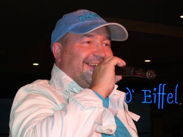 Michal David v Brně.